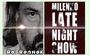 Миленко Неделковски Шоу